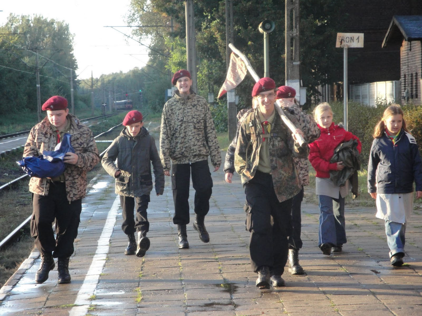 Jeden z zastępów z Organizacji Harcerskiej "Rodło"